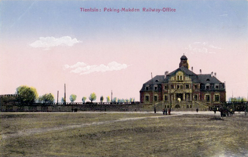 京奉铁路上的天津西站